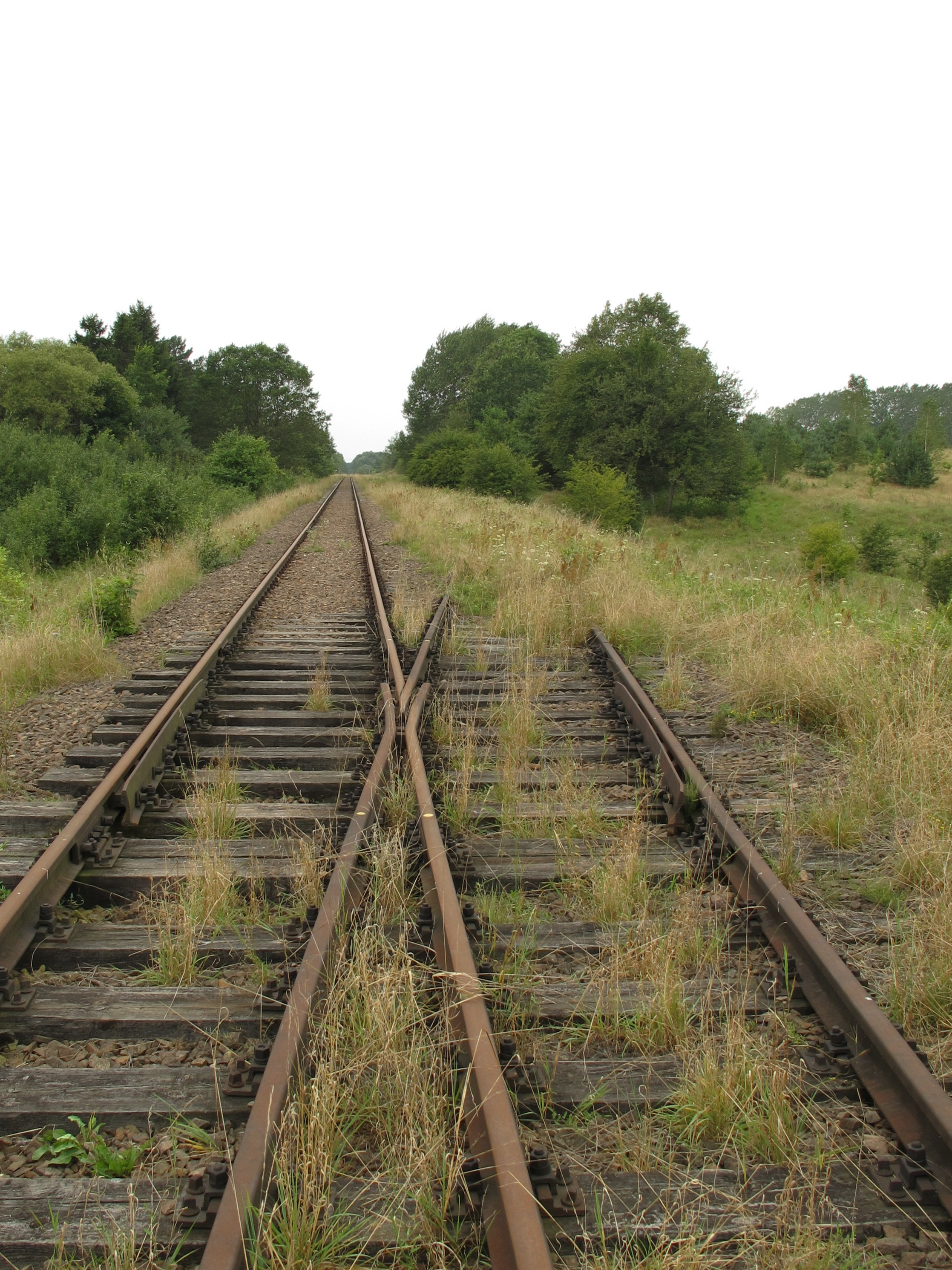 Rozjazd między liniami kolejowymi nr 37 i 58 przy kolejowym przejściu granicznym Zubki-Brzostowica (PL-BY); widok w kierunku stacji Zubki Białostockie; tor lewy: LK37, tor prawy: LK58